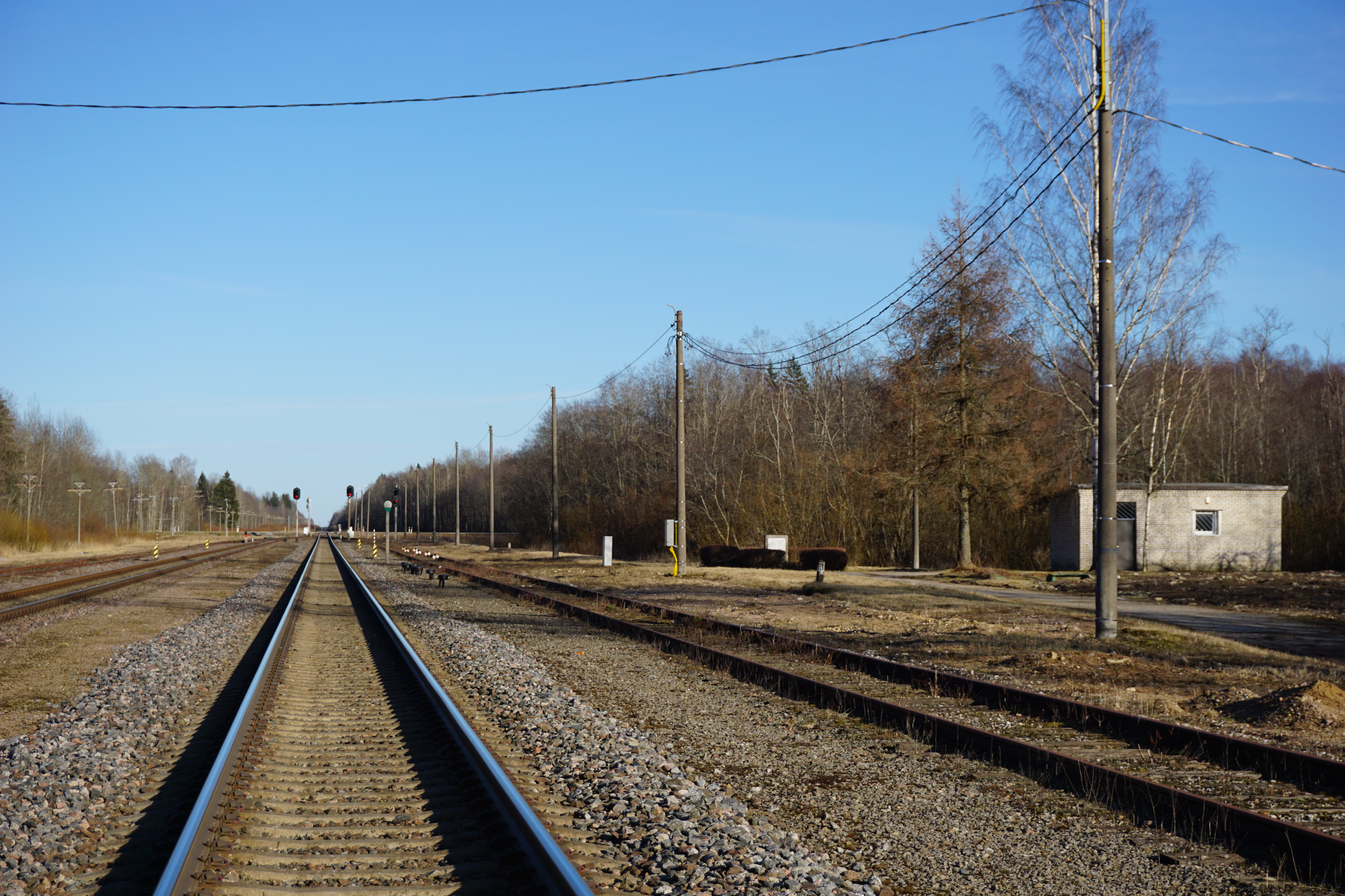 Auvere jaam